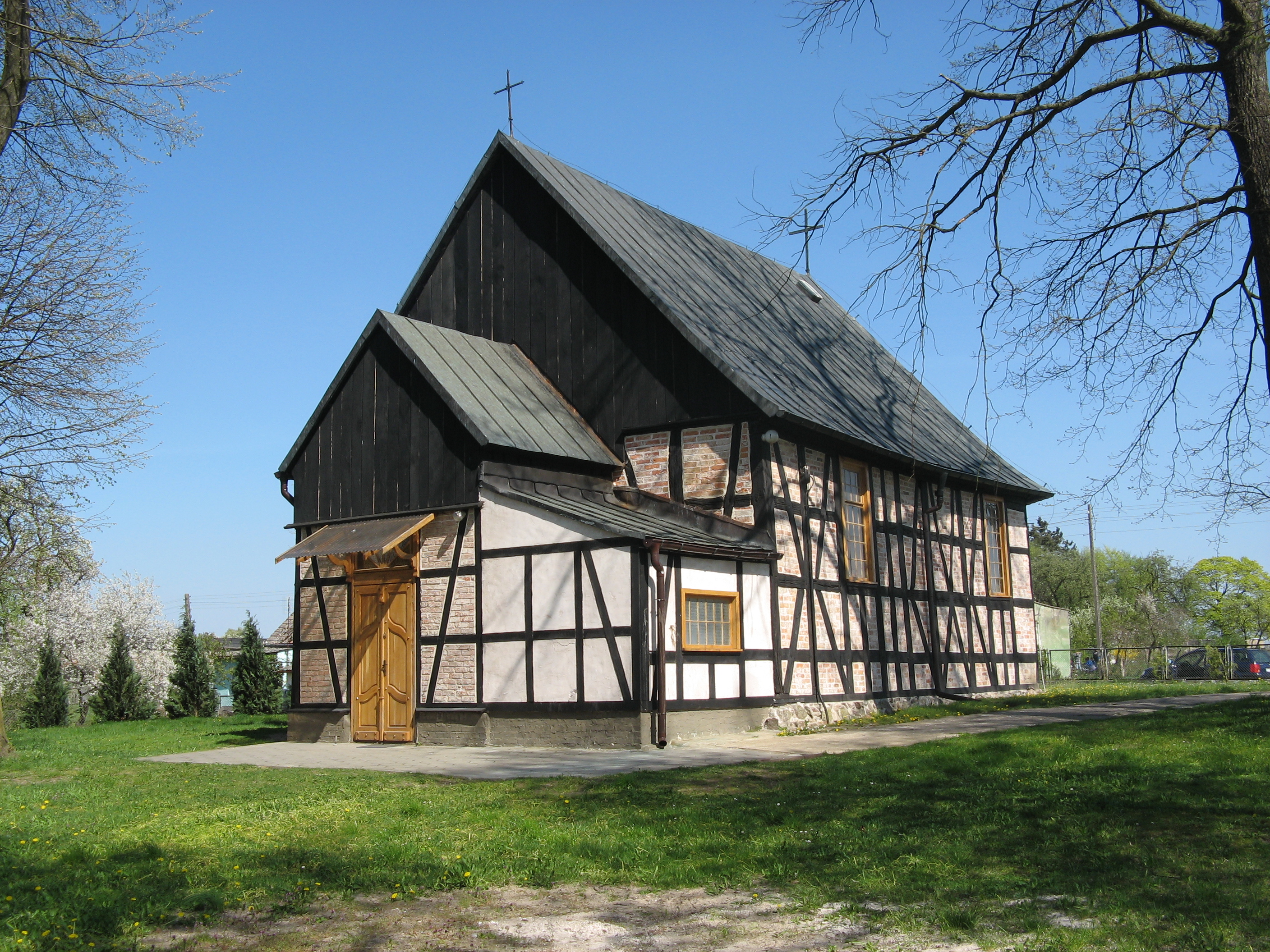 Kościół filialny p.w. Podwyższenia Krzyża Świętego w Słonowicach (zabytek nr rejestr. 73)